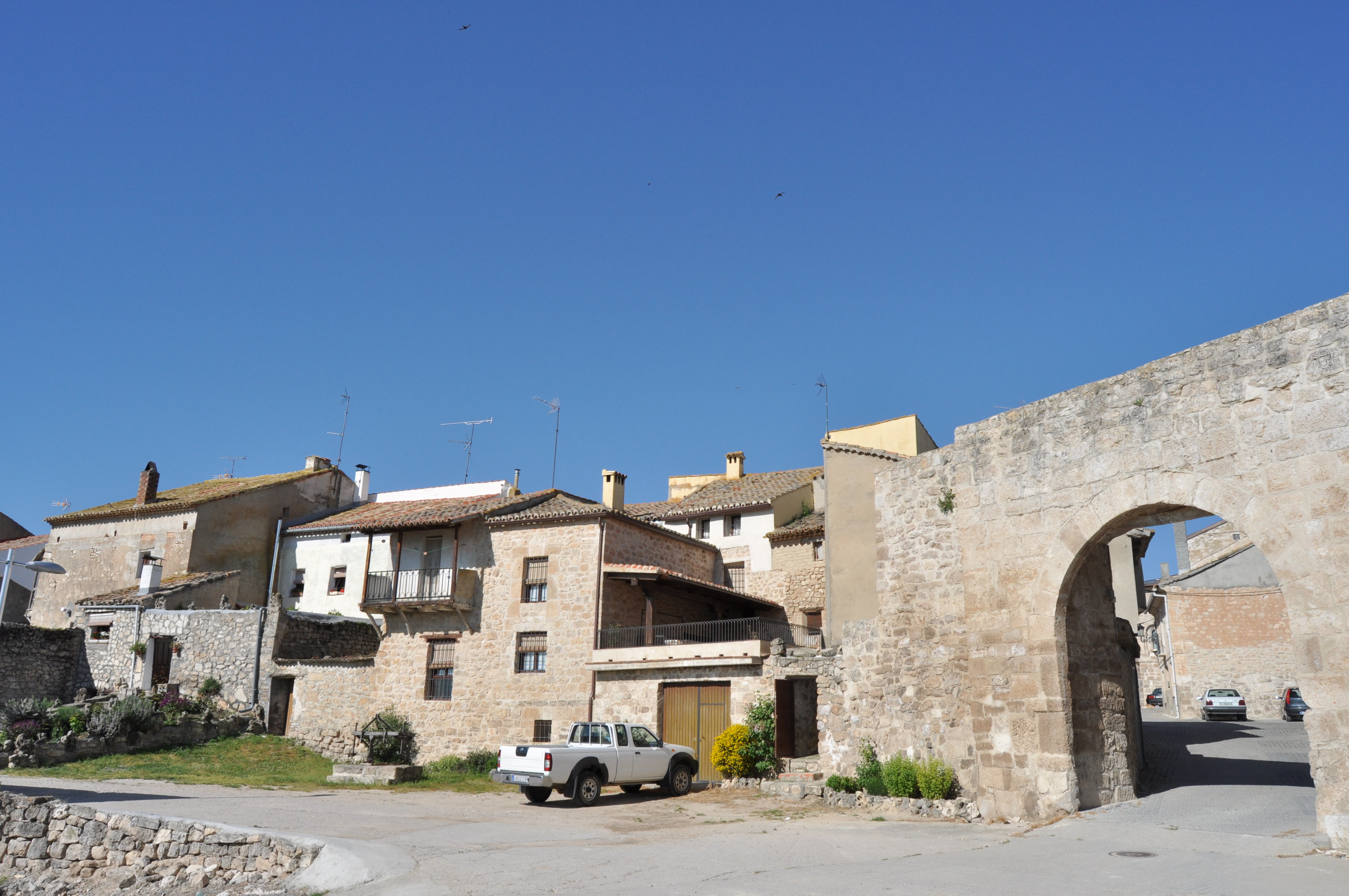 Vertavillo - 001